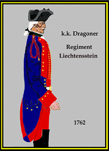 Österreichishes Dragoner-Regiment „Lichtenstein“ 1762 (Aus: L.& F. Funcken - „L'Uniforme et les Armes des soldats de la guerre en dentelle II“) Castermann (Tournai 1976)